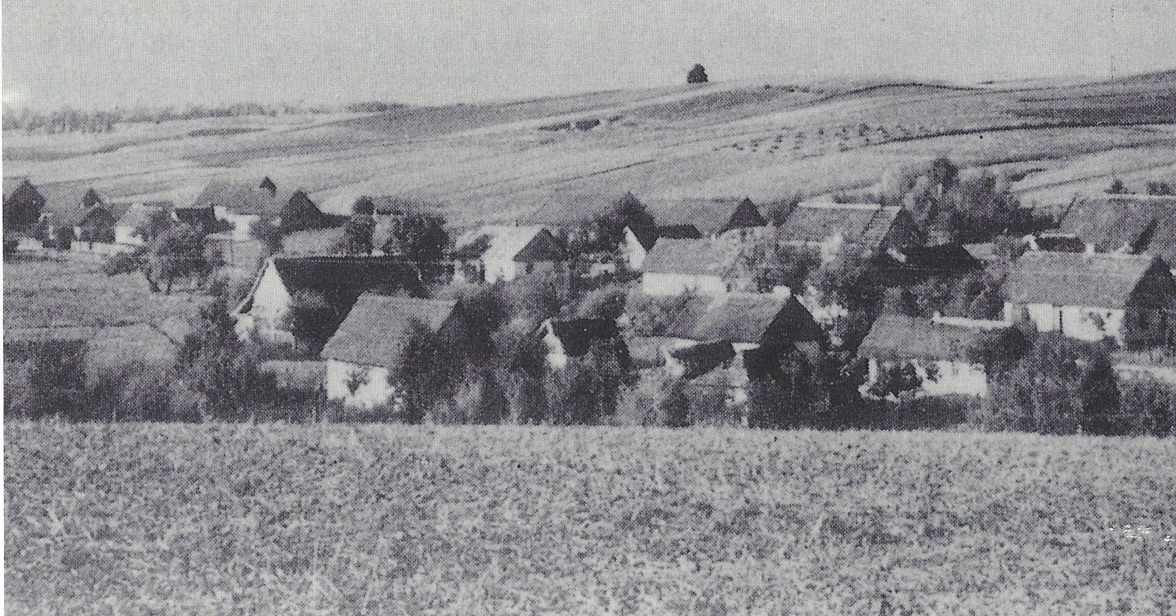 Deutsche Kolonie Selona im südlichen welligen Landesteil Wolhyniens.